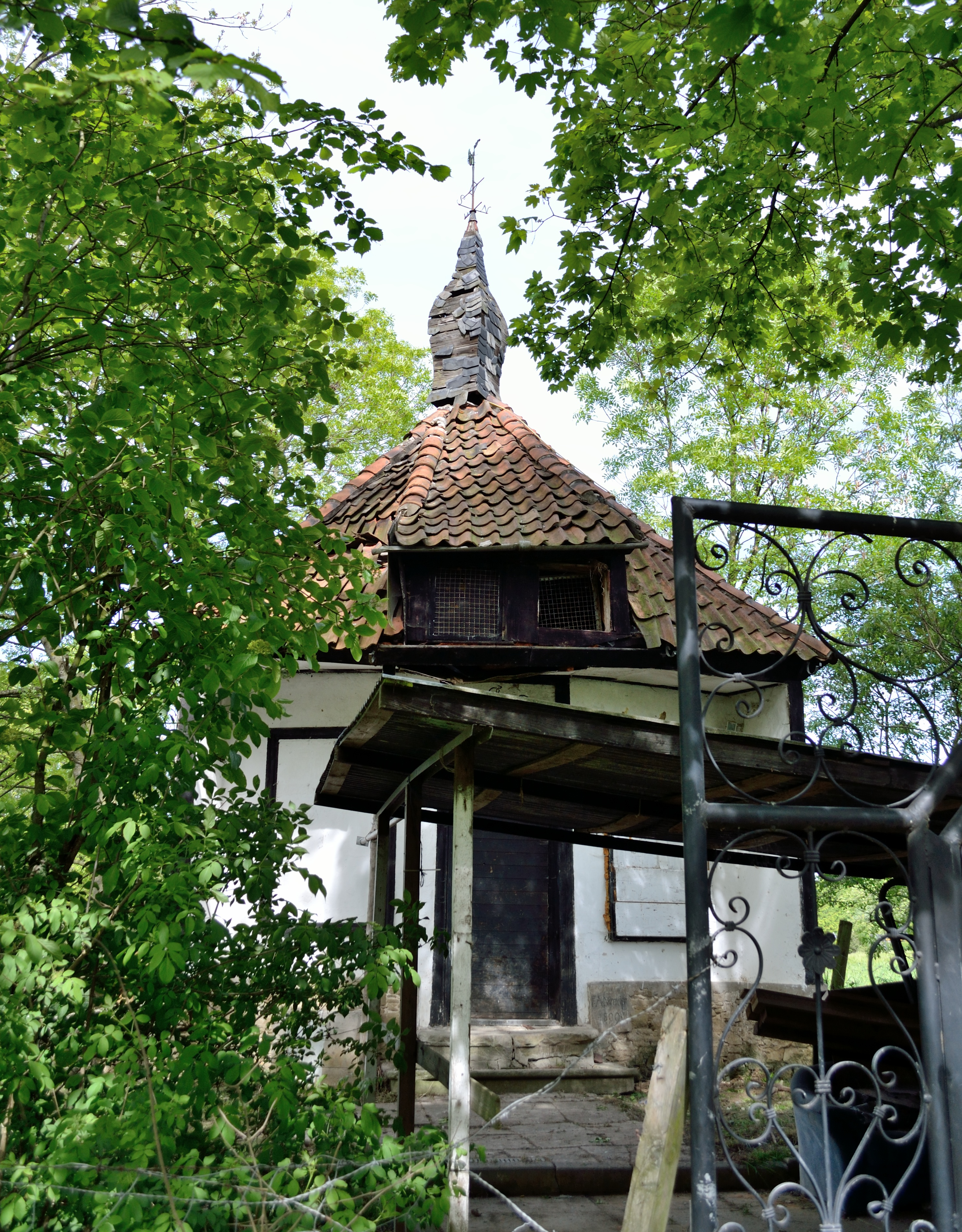 Gut Herberhausen, Objekt 4: Gartenpavillon This is a photograph of an architectural monument.